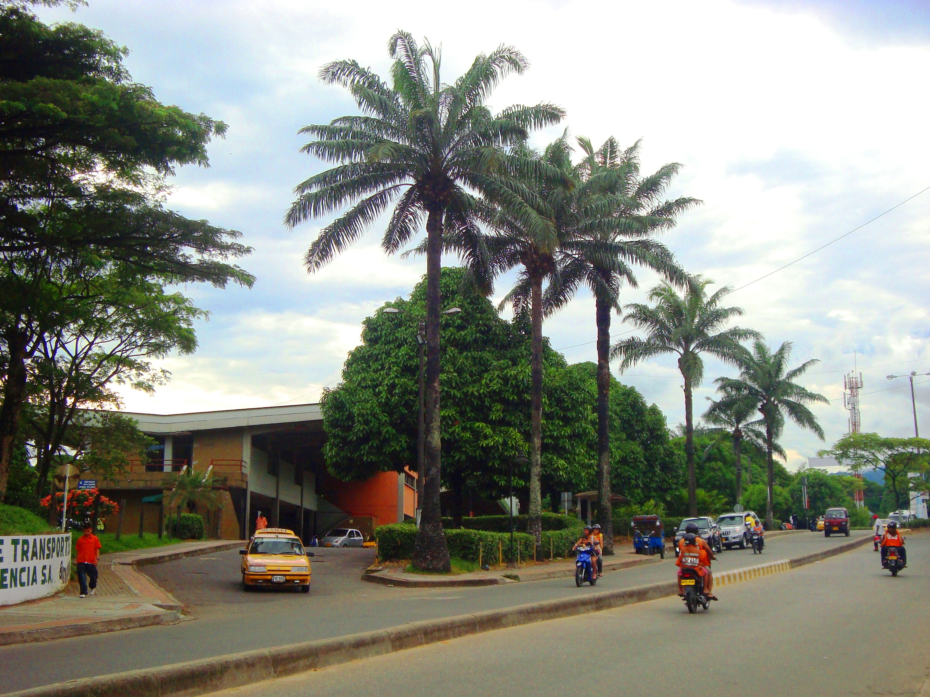 Avenida Circunvalar Roberto Claros de Florencia (Caquetá) a la altura del Terminal de Transportes.